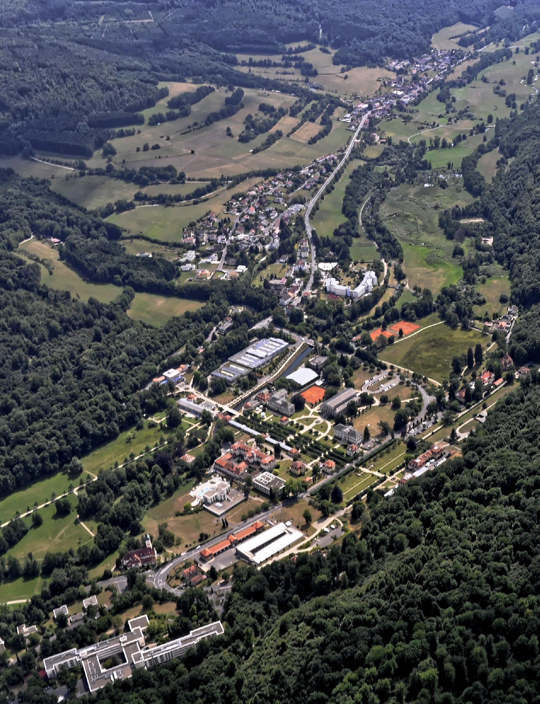 Bilder vom Flug Nordholz-Hammelburg 2015: Bad Brückenau